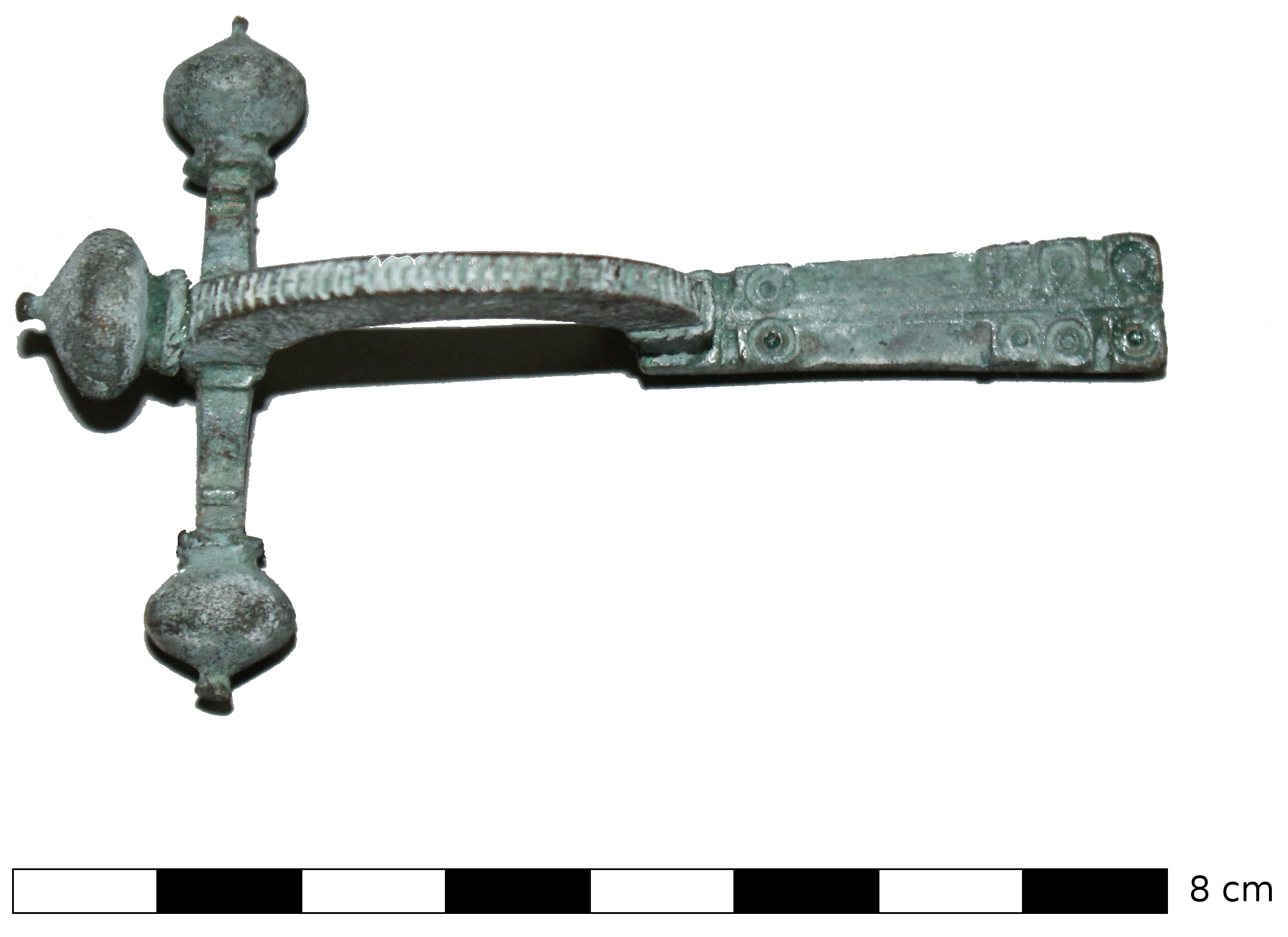 Zwiebelkopffibel aus Mursella